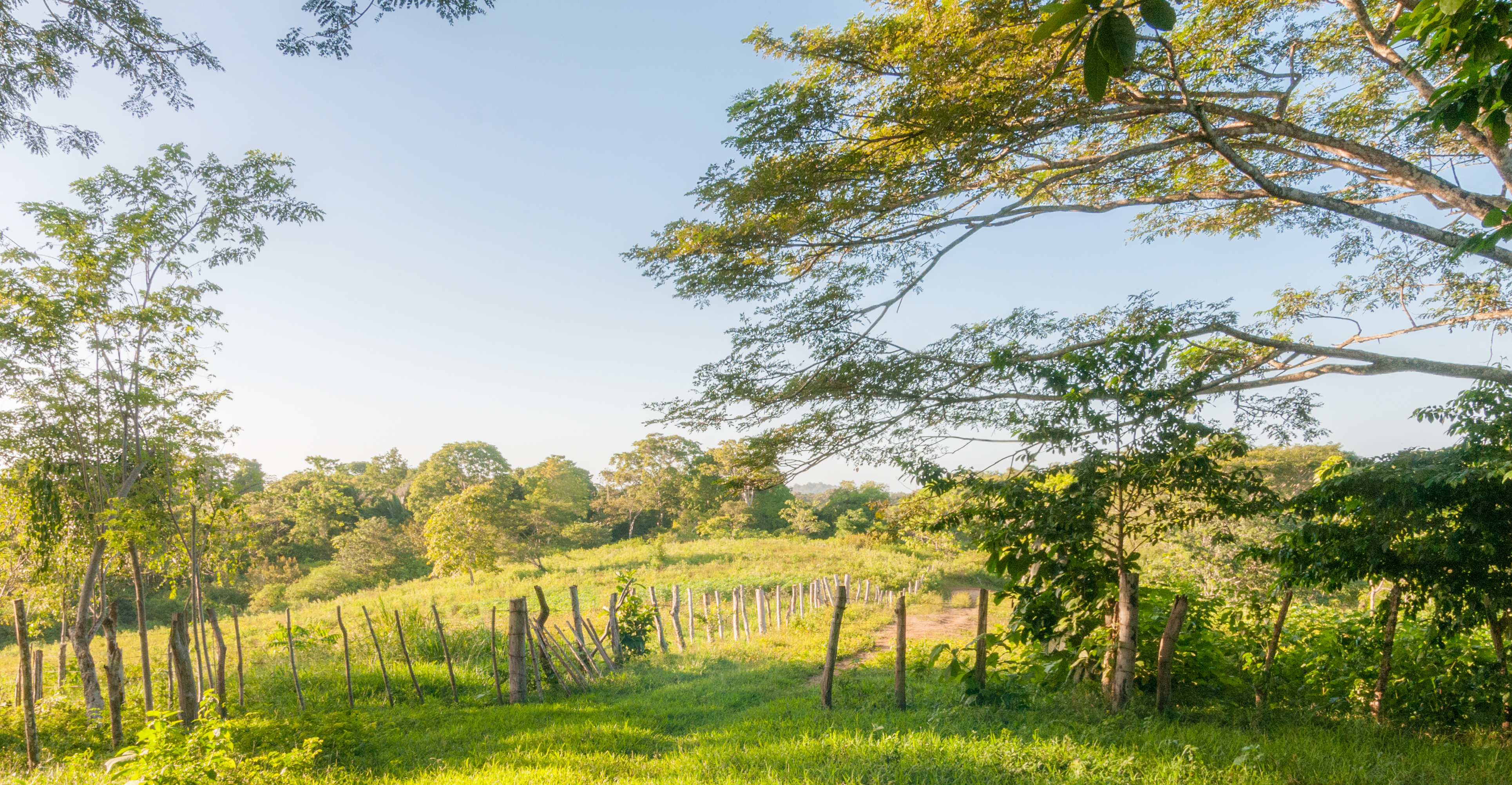 Parcela en Chaguaramal, Estado Miranda, Venezuela